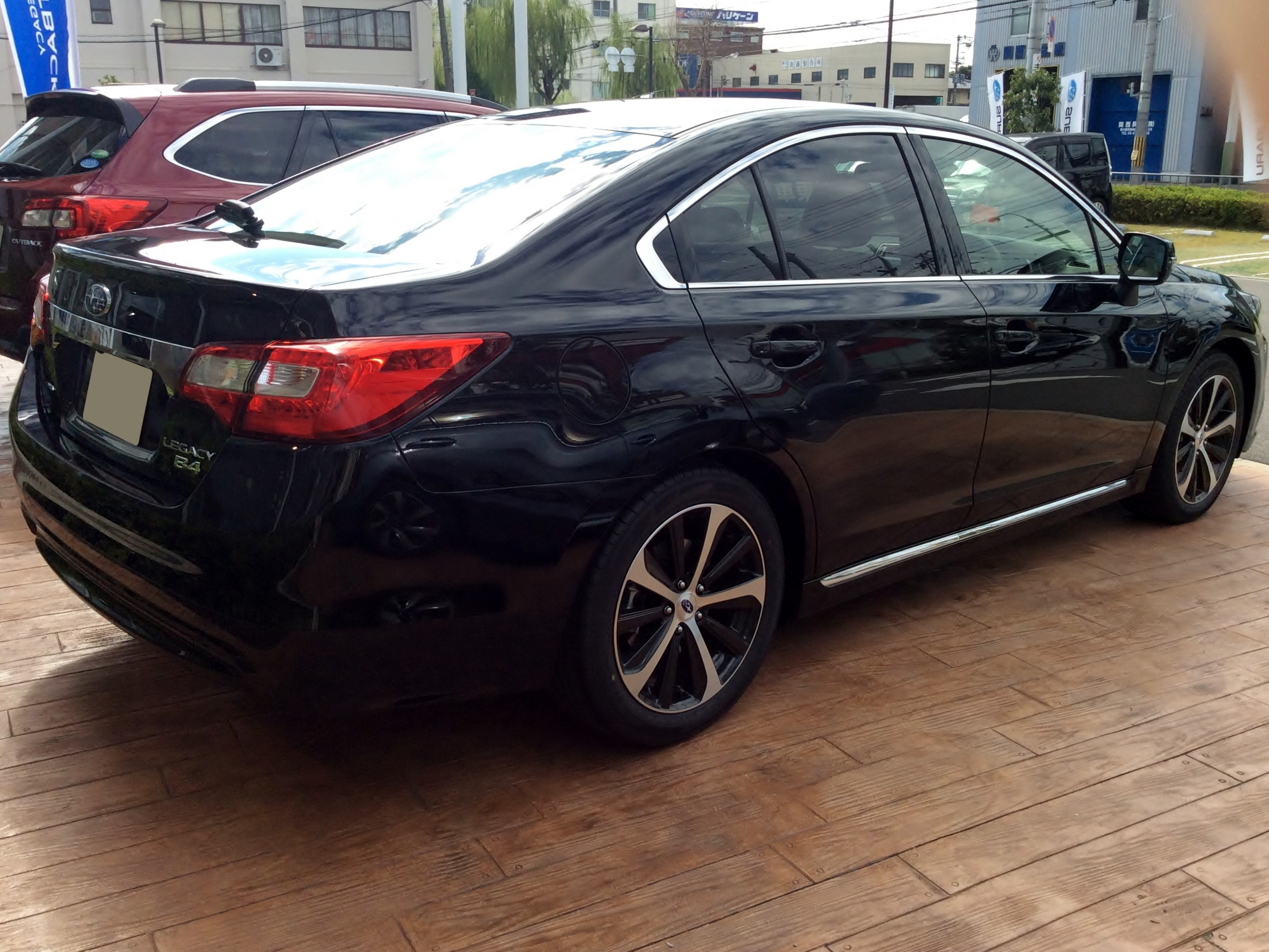 BN9型スバル・レガシィB4リミテッドをリアから撮影。